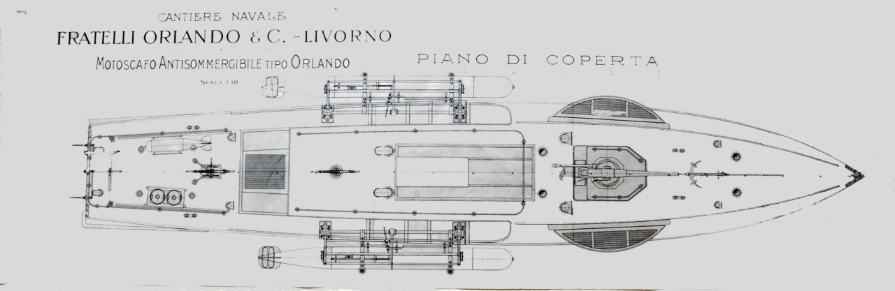 Disegno su carta lucida telata del motoscafo antisommergibile Orlando del Cantiere navale Fratelli Orlando, 1917 (AS Livorno, Archivio storico del Cantiere navale Luigi Orlando)